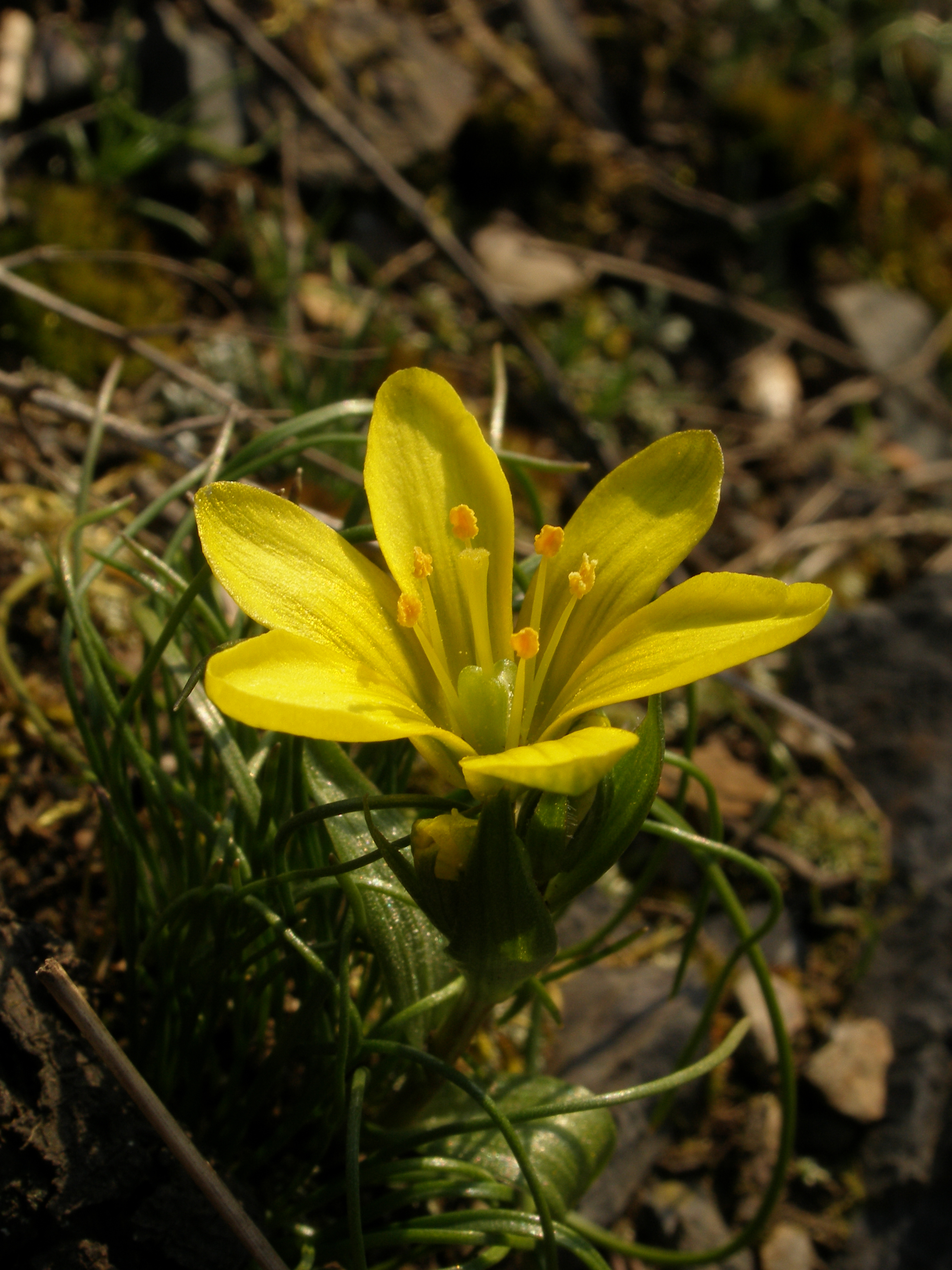 Nad Mlýnem (přírodní památka) - brzké jaro - Gagea bohemica (Zauschner) J. A. Schultes et J. H. Schultes subsp. bohemica, křivatec český pravý - status ohrožení v ČR: C2 (silně ohrožený)